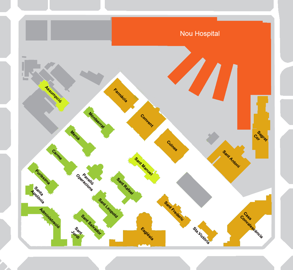 Esquma pavellons de l'Hospital de la Santa Creu i Sant Pau (Barcelona, Catalunya)